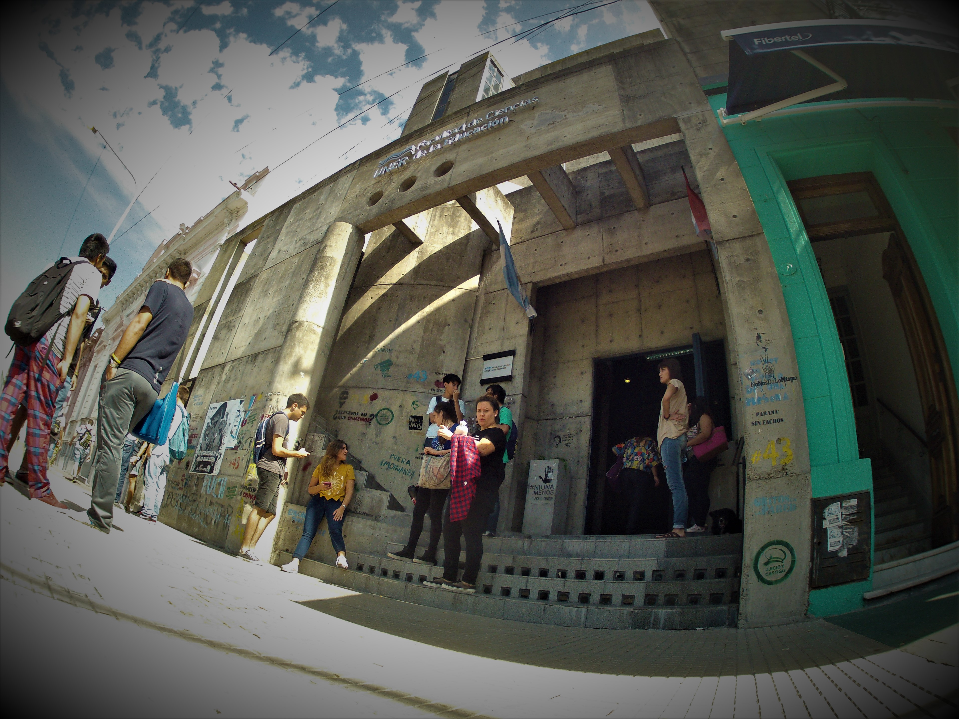 Fachada edificio de cursado, calle Buenos Aires 389